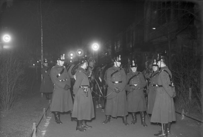 Demonstrationsverbot in Berlin! Berittene Schutzpolizei in Bereitschaft zur Verhinderung von Demonstrationen in den Anlagen des Nollendorfplatzes in Berlin.